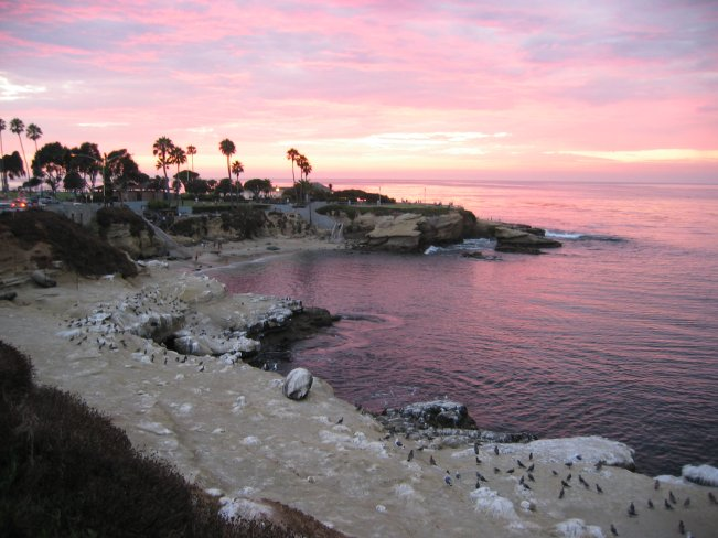 La Jolla, La Jolla Cove, 2004